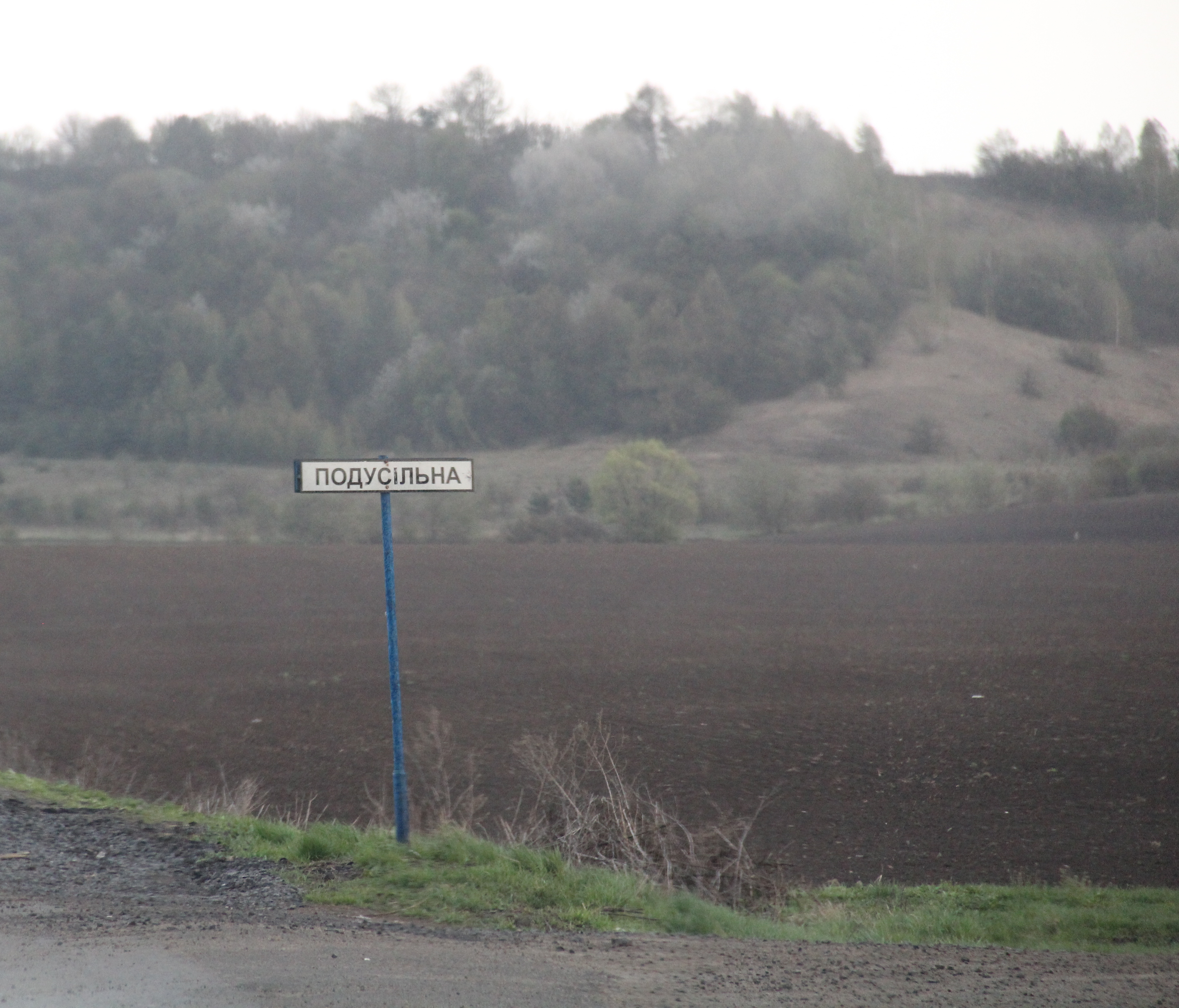 Вказівник при в'їзді в село